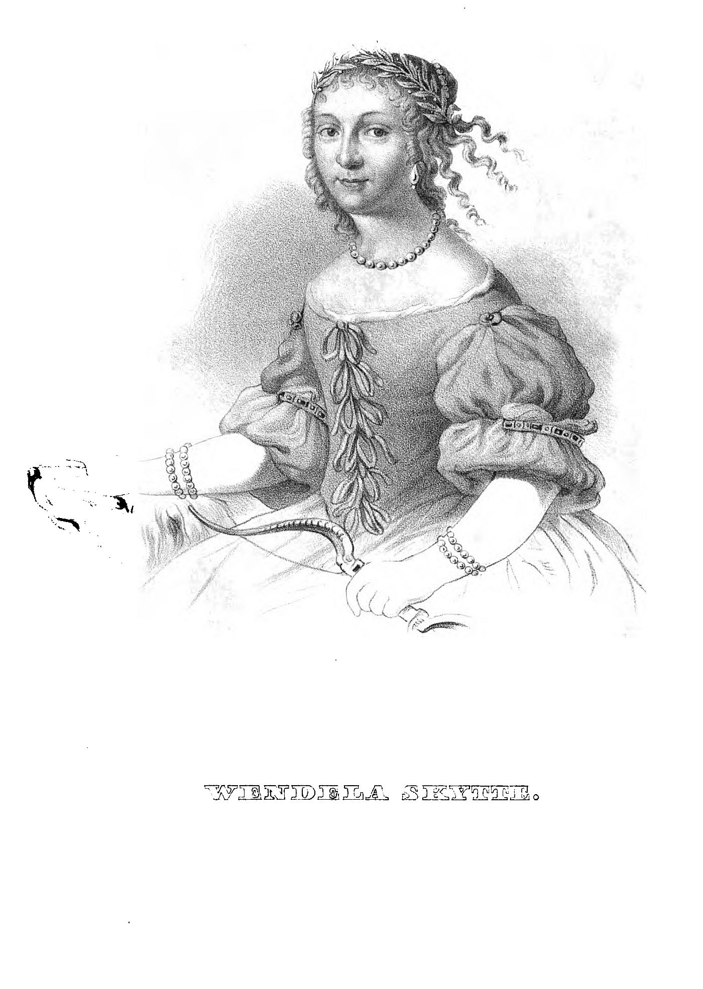 Vendela (äv. Wendela) Skytte, född 8 december 1608, död 18 augusti 1629 (pest), var en svensk adelsdam, författare (poet), brevskrivare och känd akademisk personlighet.